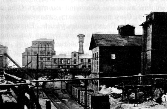 Корсуньская копь № 1 (ныне - шахта Кочегарка), г. Горловка